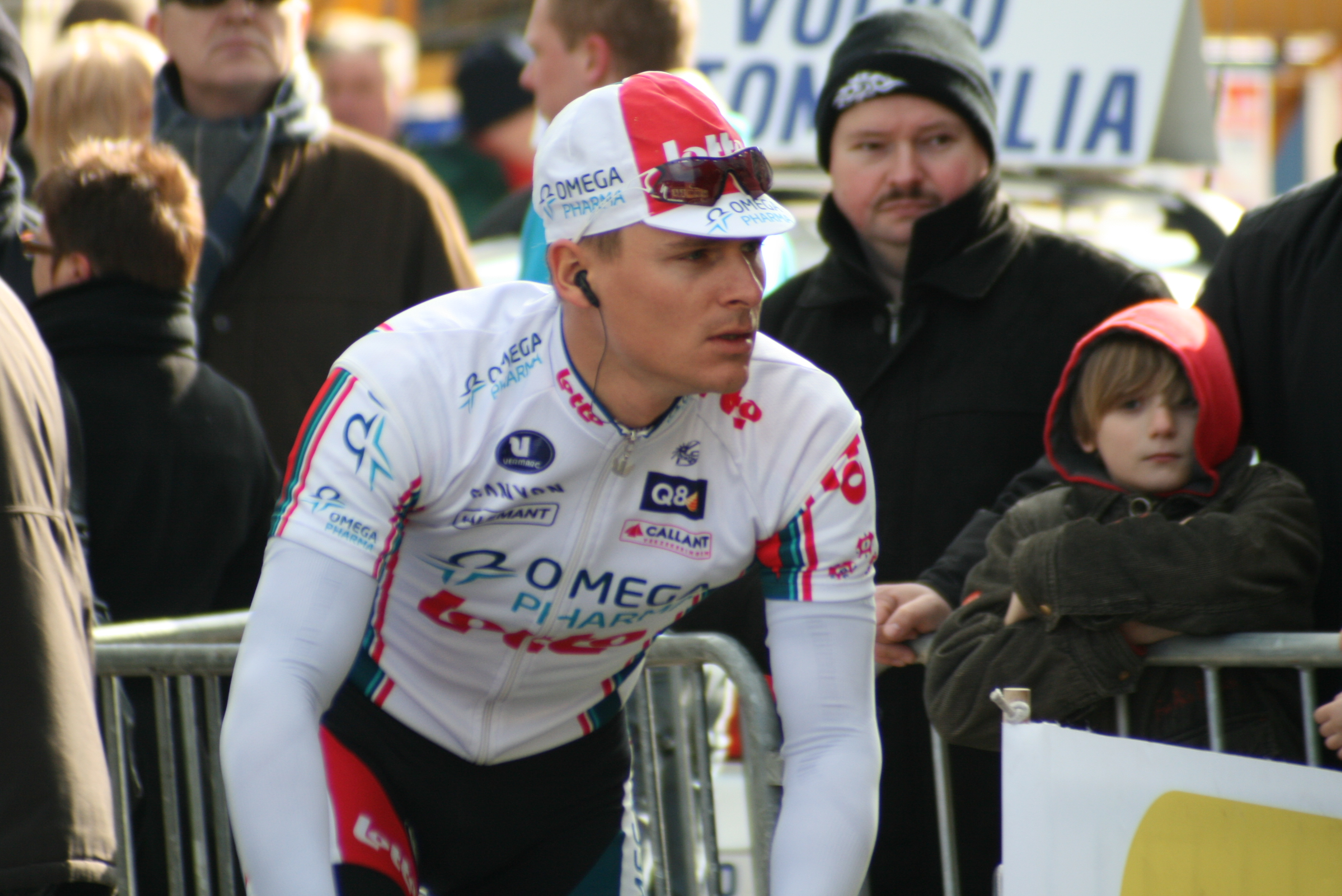 Tom Stubbe lors des Trois jours de Flandre occidentale 2010